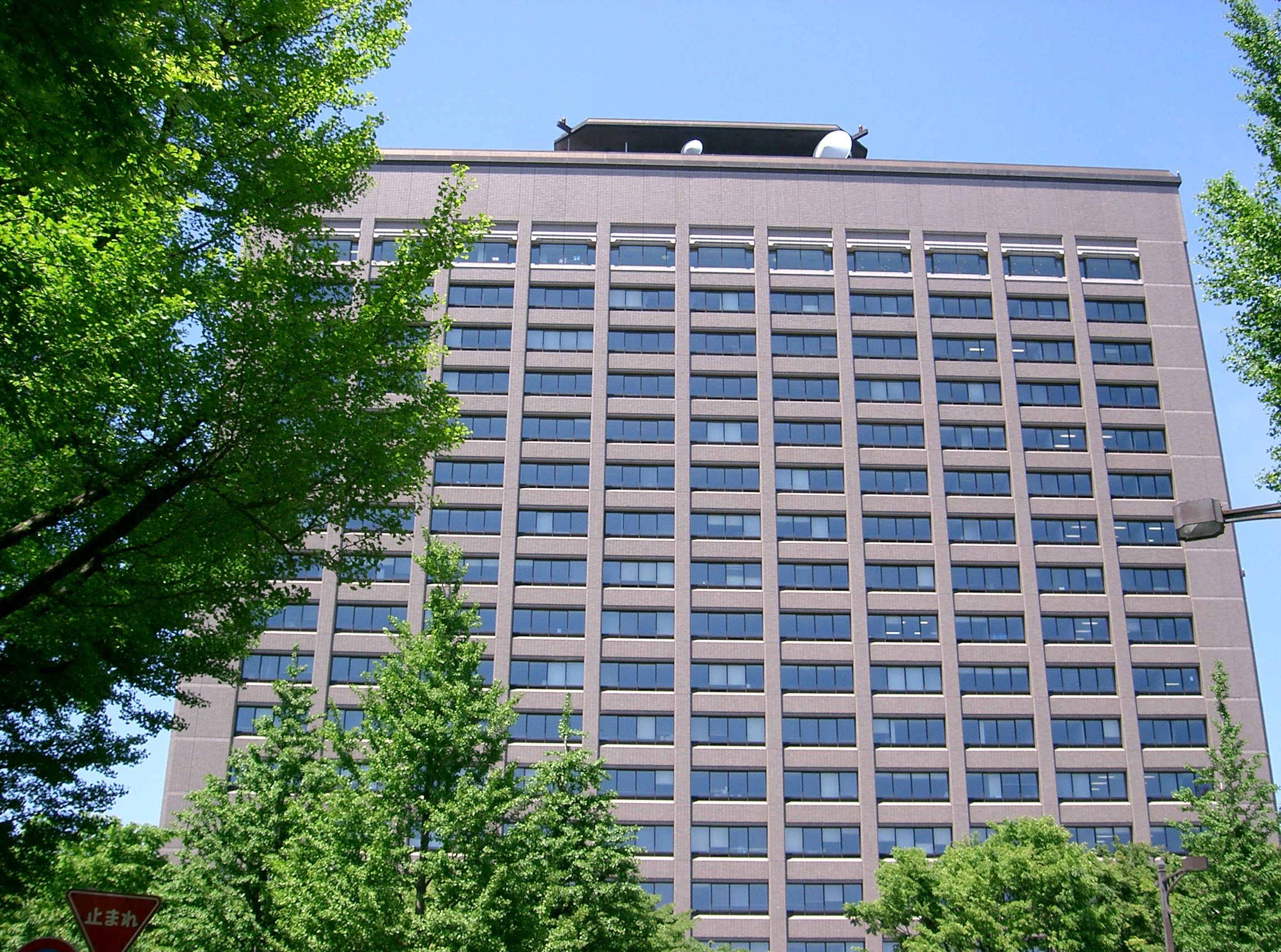 宮城県庁